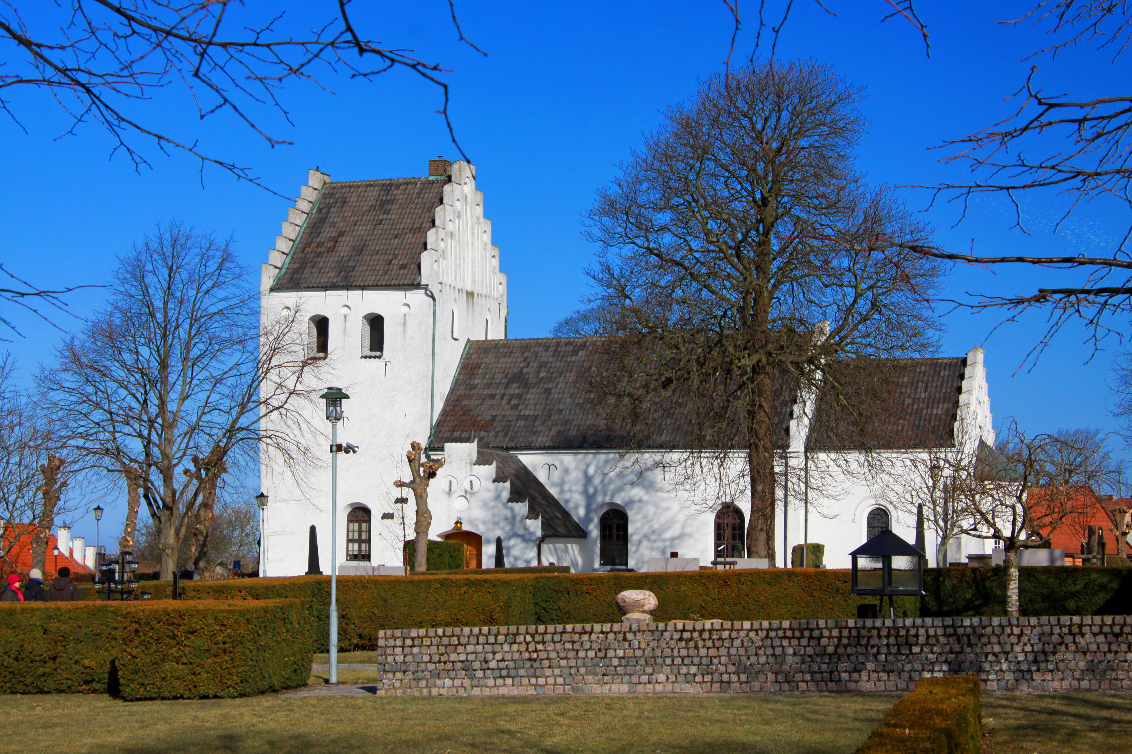 Glumslövs kyrka.